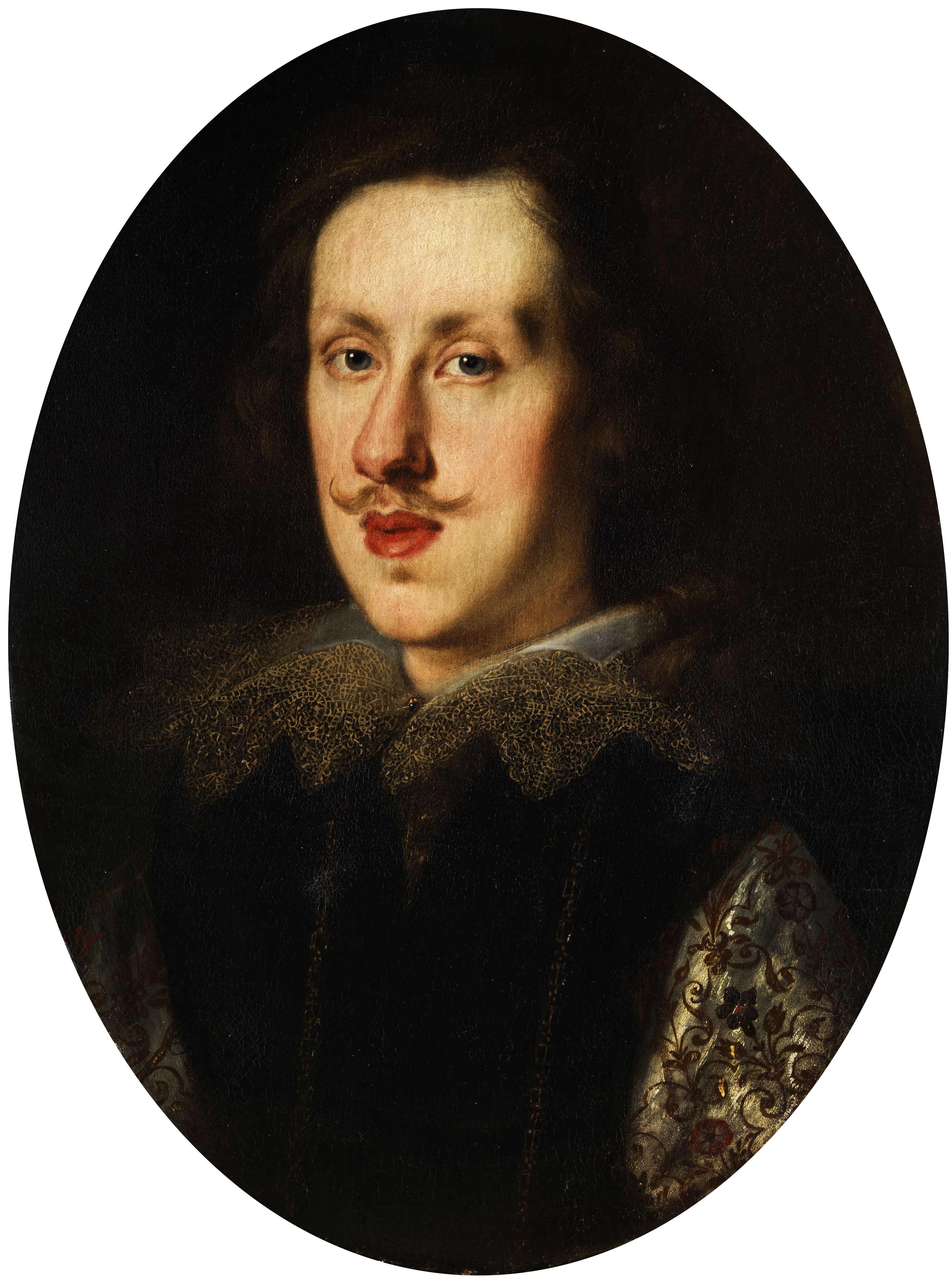 Portrait wohl des Cosimo II. de'Medici, Großherzog von Toskana (angeboten bei Hampel als Portrait "Philipp IV. von Spanien"). Öl auf Leinwand. 58 x 43 cm.